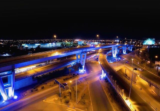 Puente Lázaro Cárdenas y López Mateos